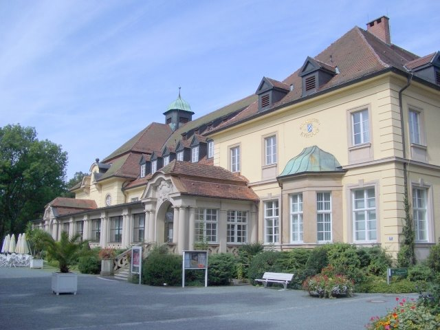 Bad Steben, staatliches Kurhaus von 1911 im Kurpark